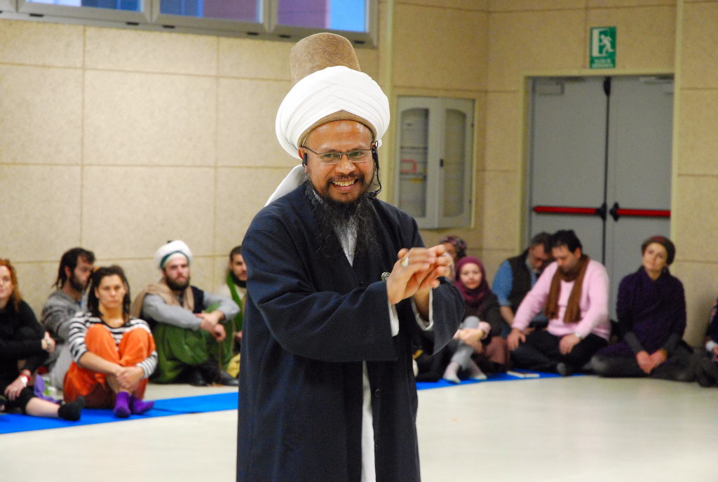 Sheijk Ahmed Dede en Madrid